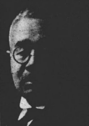 戸井嘉作（1862～1945）